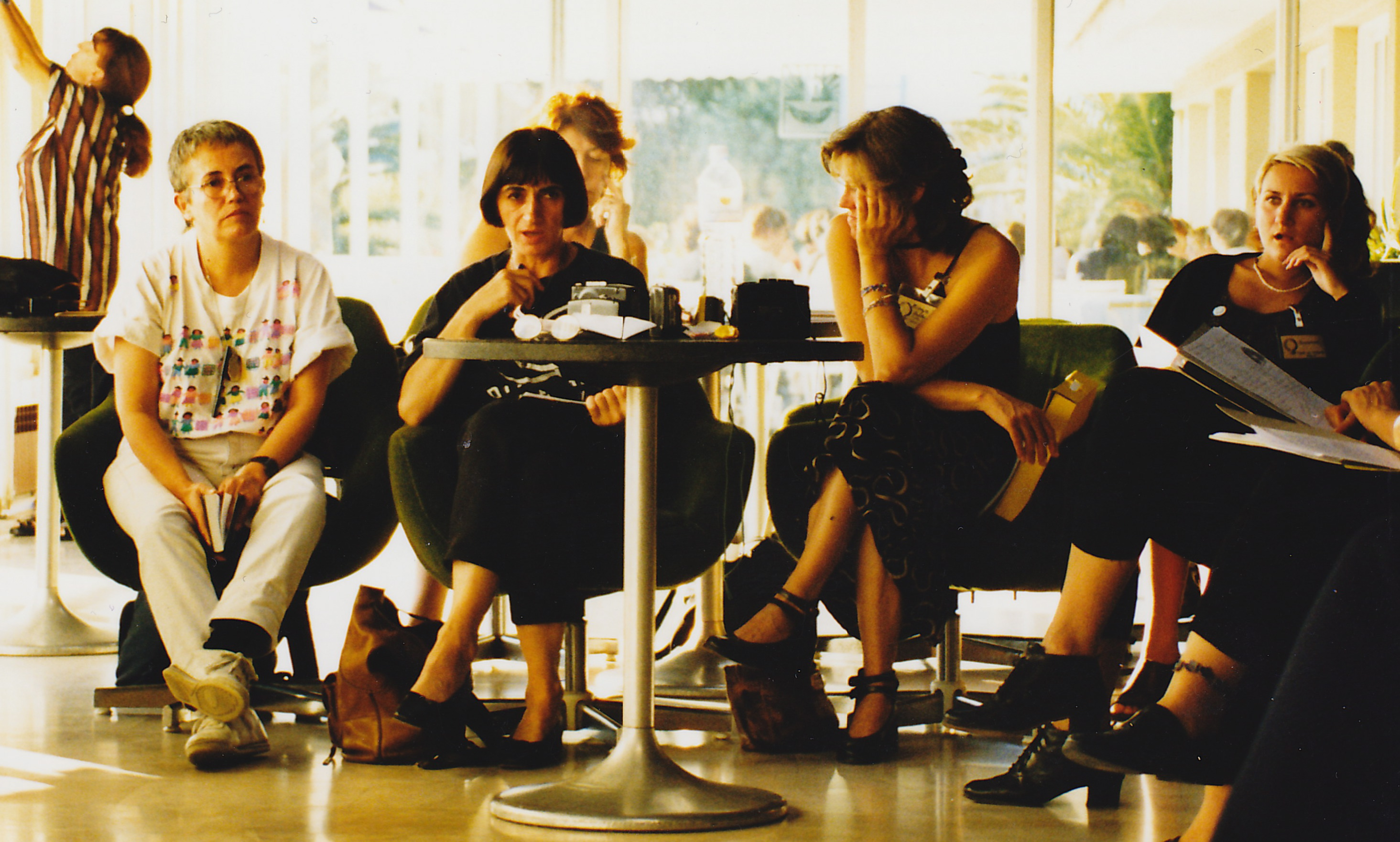 Ximena Bedregal y Staša Zajović sesión de trabajo en el Encuentro Internacional de Women in Black Ulcinj, Montenegro 1999